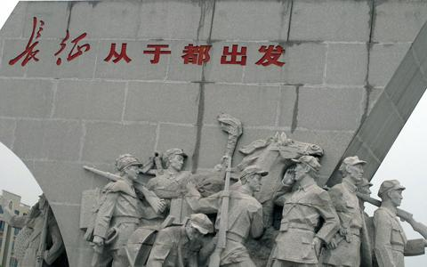 中央红军长征出发纪念碑。中央红军是从于都出发开始长征的